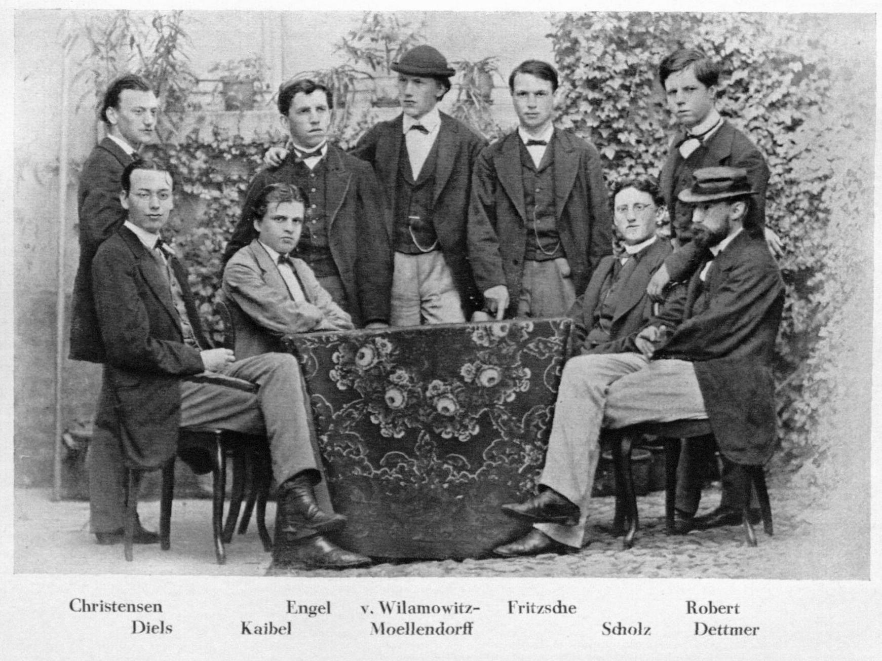 Diels, Robert, Kaibel, Wilamowitz und andere Studenten (Mitglieder des Bonner Philologischen Vereins), Sommersemester 1869 Christensen = Christensen, Heinrich (aus Hamburg) * 23. Juli 1849, ab 1887 Gymnasialprofessor am Wilhelm-Gymnasium in Hamburg, † 1921 (Franz Bömer: Wilhelm-Gymnasium Hamburg: 1881-1956, Hamburg 1956) Dettmer = Dettmer, Hermann (aus Lübeck) * 21. Juli 1846, Promotion 7. August 1869 (De Hercule Attico), † (Reitunfall) 29. Juli 1870, noch vor dem Examen Diels = Diels, Hermann Alexander (1848–1922) Engel = Engel, Walther (aus St. Wendel), Oberlehrer am Viktoriagymnasium in Potsdam, * 15. Oktober 1847 in Dörrenbach/St. Wendel, † 1921; enger Freund Diels' Fritz[sch]e = Fritze, August, * 20. August 1848, Gymnasiallehrer in Wiesbaden, † 30. Dezember 1902 Kaibel = Kaibel, Georg (1849–1901) Robert = Robert, Carl (1850–1922) Scholz = Scholz, Gustav (aus Wiesbaden) * 13. September 1848, Gymnasiallehrer in Wiesbaden, † 9. Mai 1892 v. Wilamowitz-Moellendorff = Wilamowitz-Moellendorff, Ulrich von (1848–1931) Reference: Wilt Aden Schröder, Photo 11 in Wilamowitz-Bildnisse, Philologus 151 (2007)